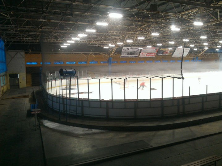 Zimní stadion Rosice levá strana kluziště, rok 2018